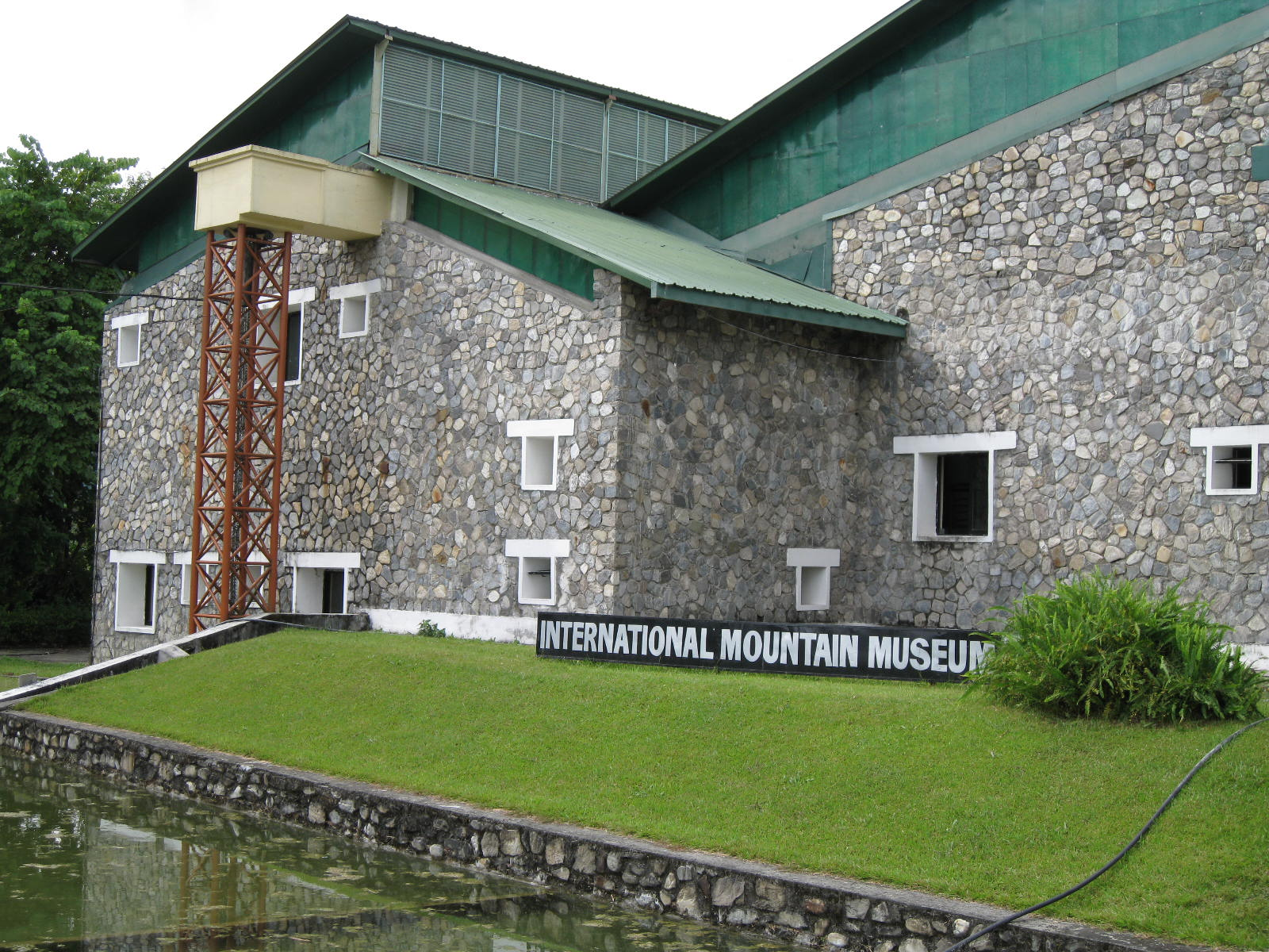 International Mountain Museum, Pokhara, Nepal.